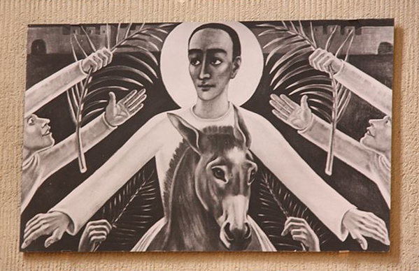 Hamburg, Langenhorn, Ansgarkirche, Innenraum, Reproduktion des Altaraufsatzes von Anita Ree